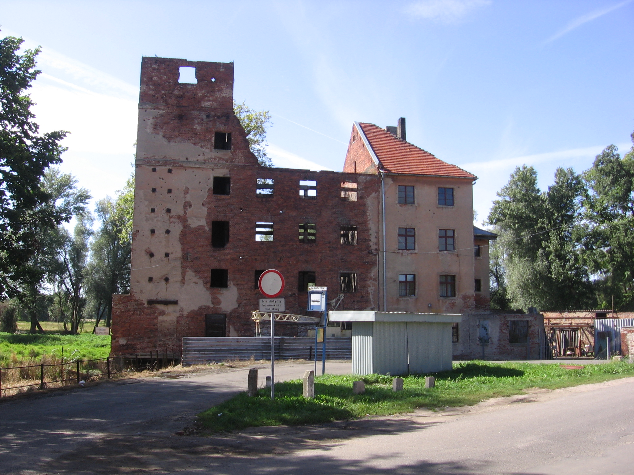 Ruiny młyna w Jarnołtowie. Pętla autobusowa „Jarnołtów” z wiatą.